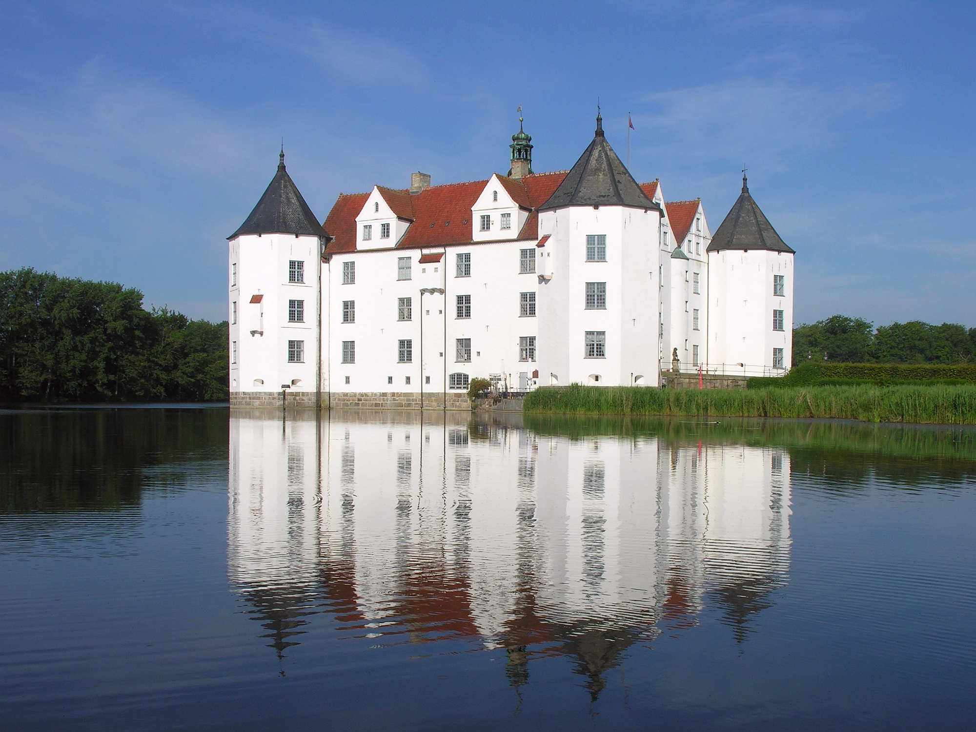 Kulturdenkmal Schloss Glücksburg 4.1f Wasserschloss Ansicht von Nordosten - Schleswig-Holstein - Foto 2012 Wolfgang Pehlemann Steinberg/Ostsee DSCN0197